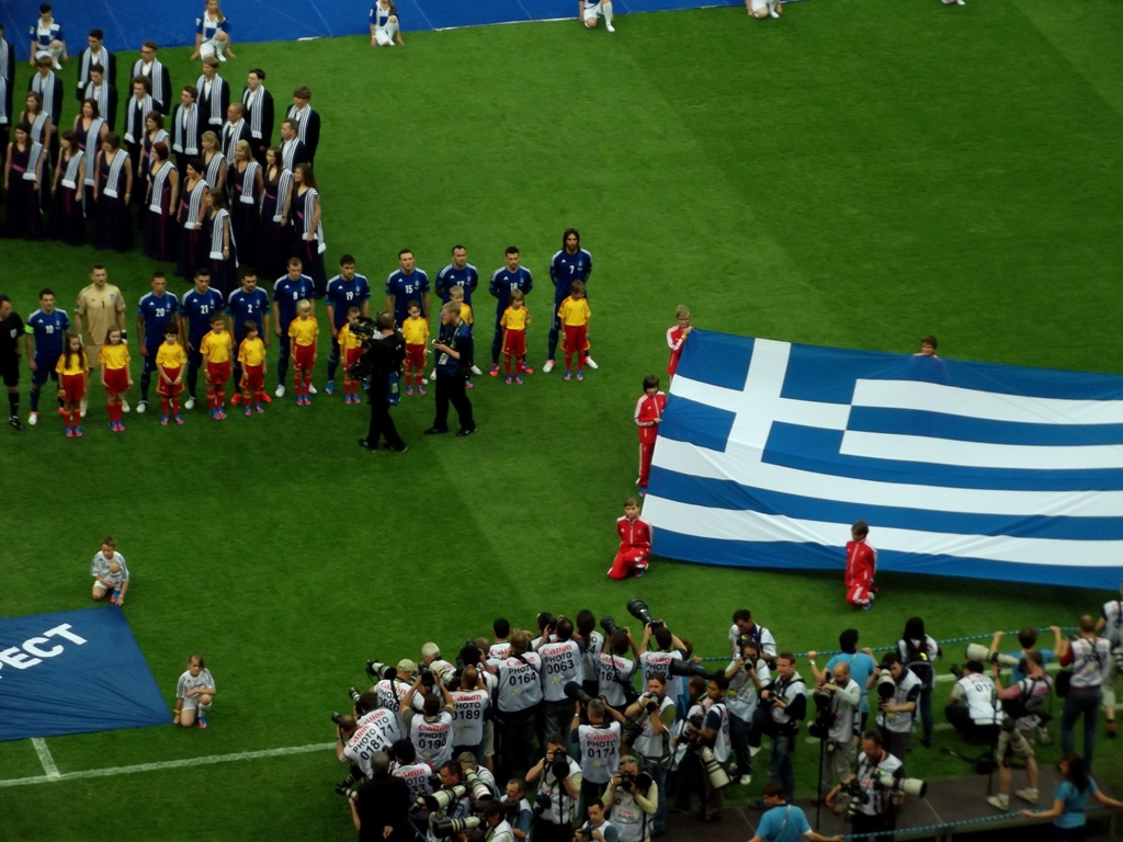 Zdjęcie zrobione w pierwszym dniu UEFA Euro 2012 w Warszawie, dniu otwarcia turnieju i meczu Polska-Grecja.